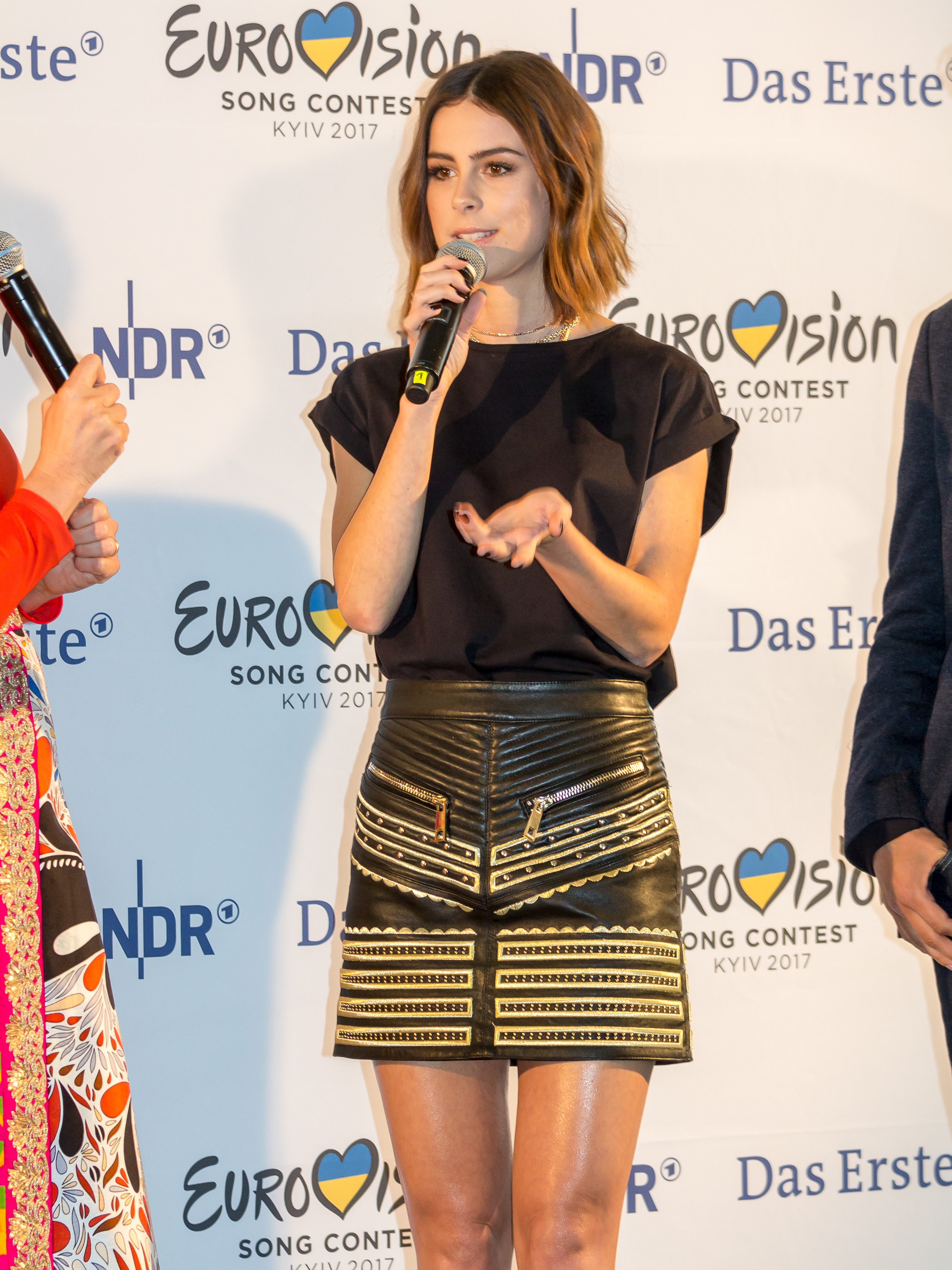 Unser Song 2017 - Pressekonferenz am Probentag Foto: Lena Meyer-Landrut